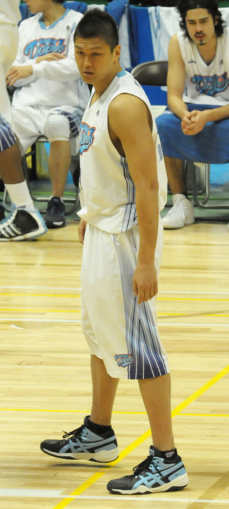 三菱電機ダイヤモンドドルフィンズ、佐藤浩貴選手。横須賀アリーナで。